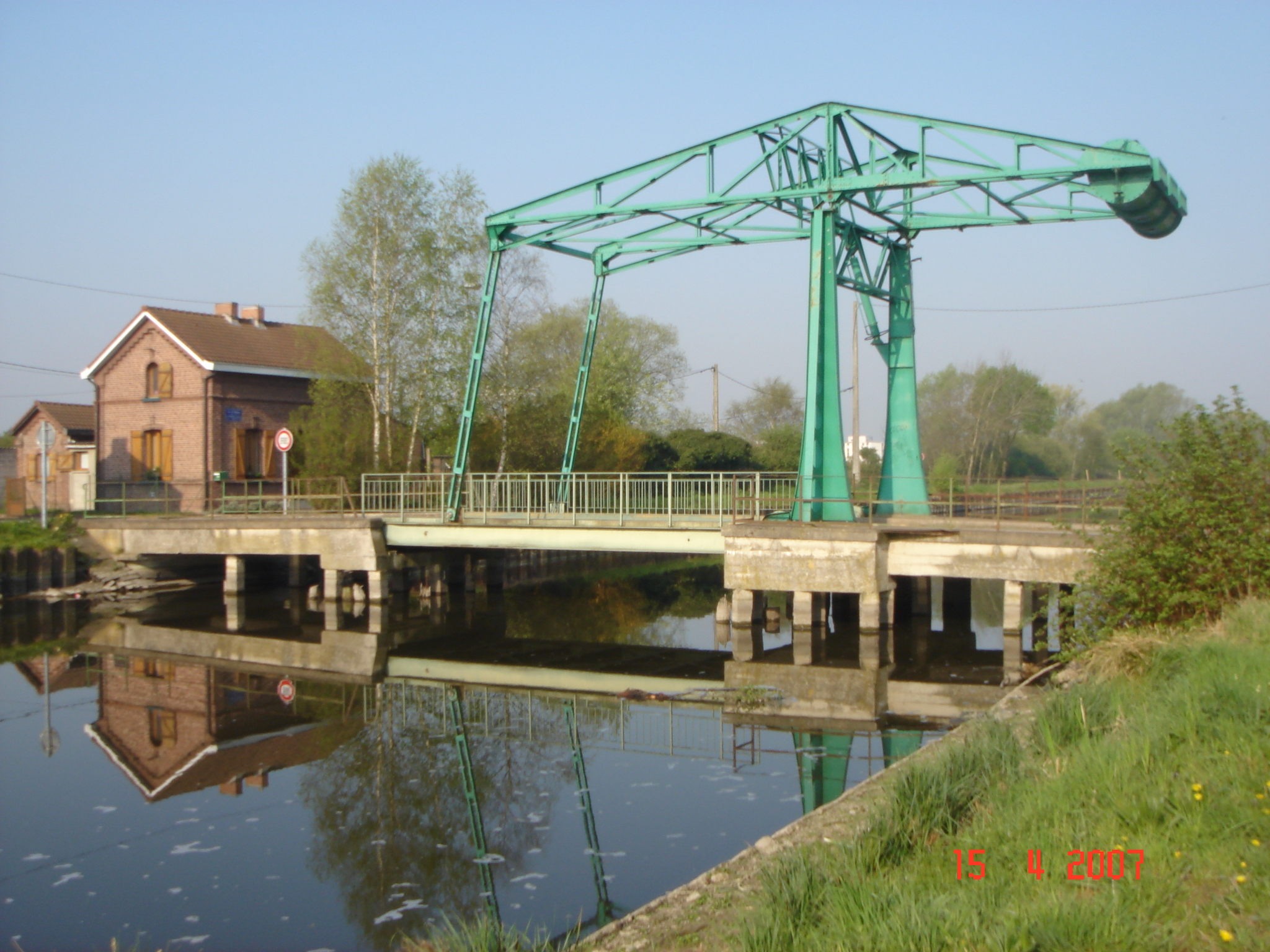 Lallaing Pont de Germinies